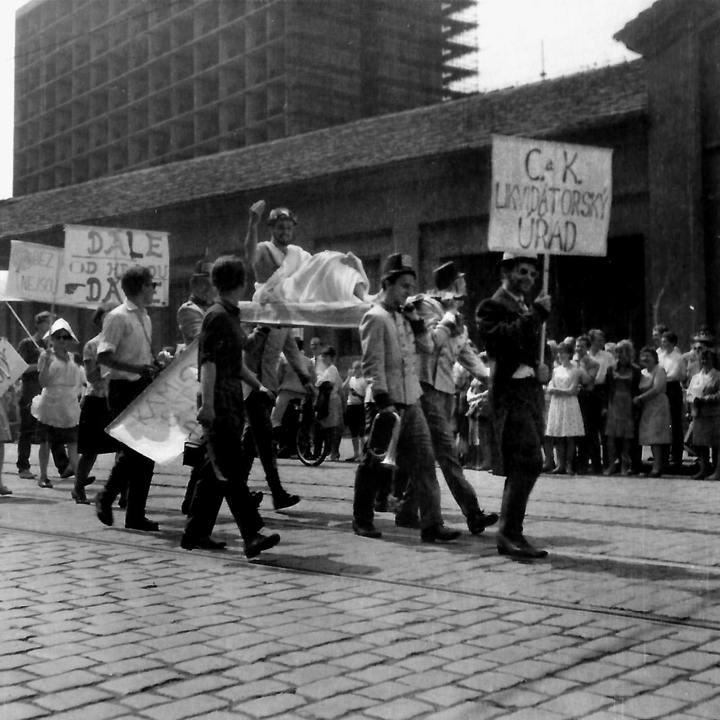 Majáles 1966-průvod studentů Prahou